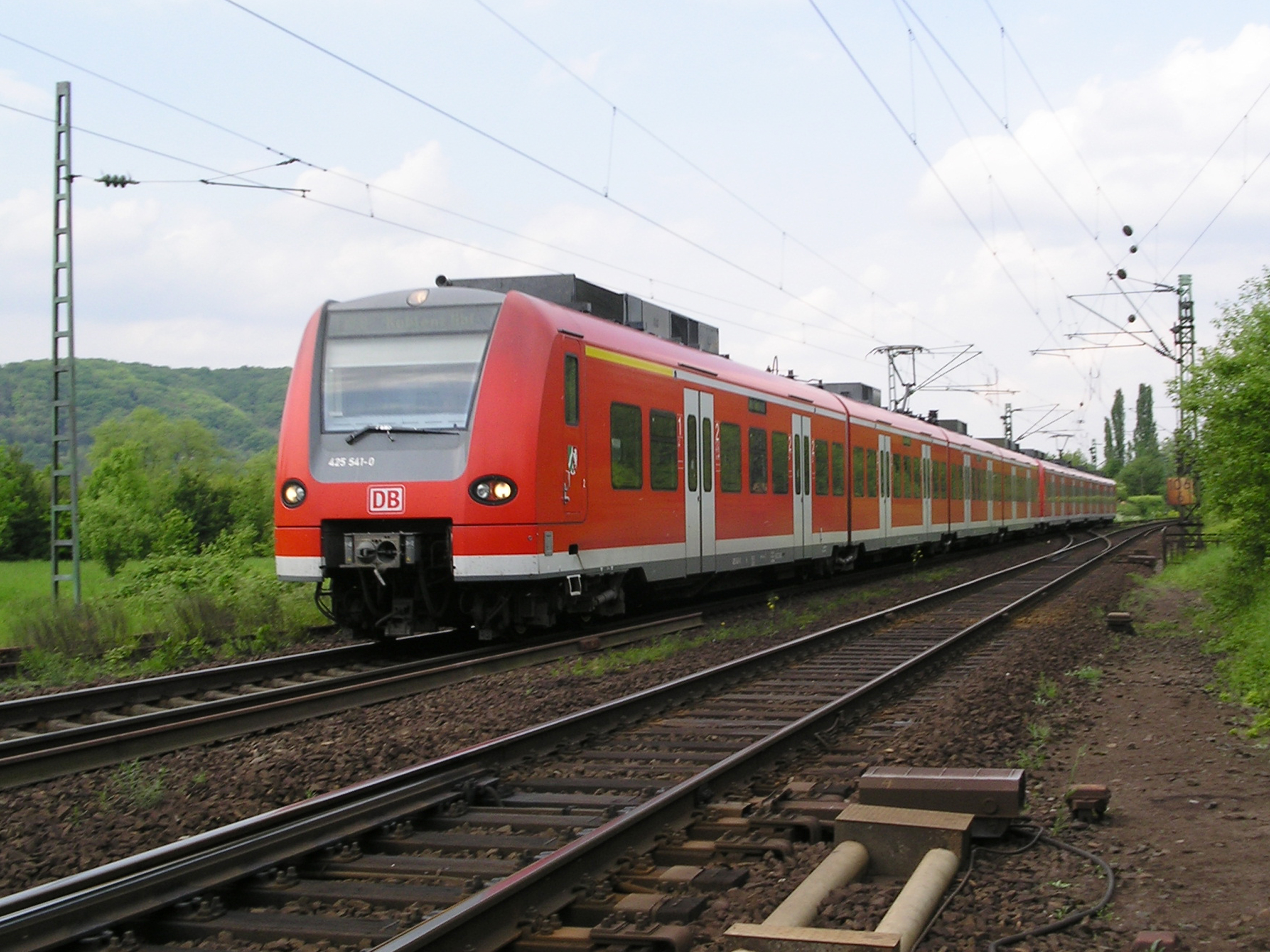 Baureihe 425 541-0 bei Unkel